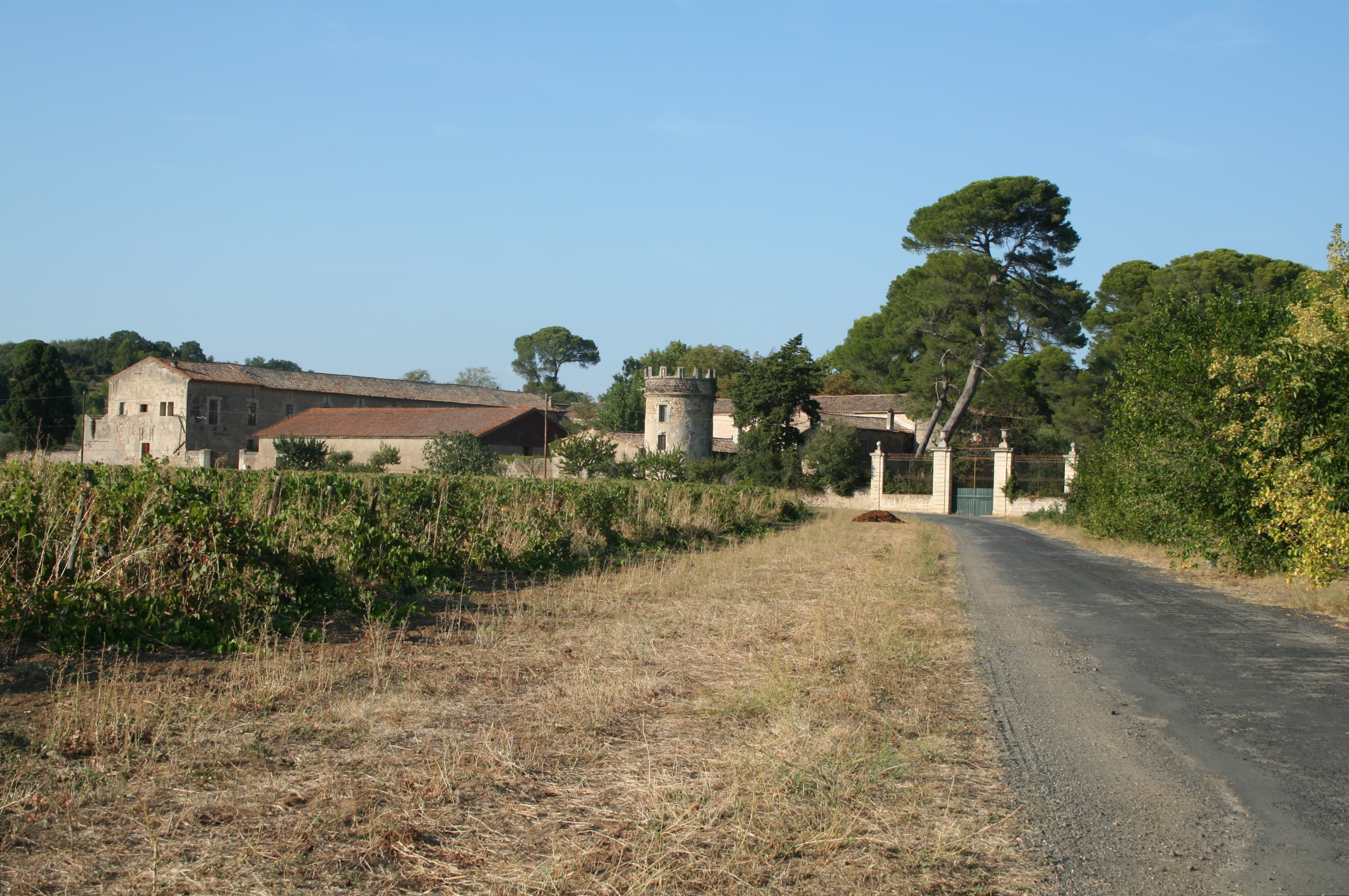 Pézenas (Hérault) - la Grange des Prés.